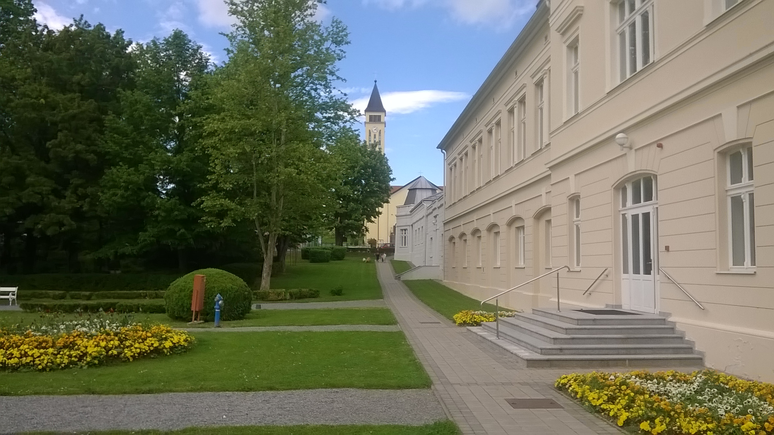 Lipik Kurhaus